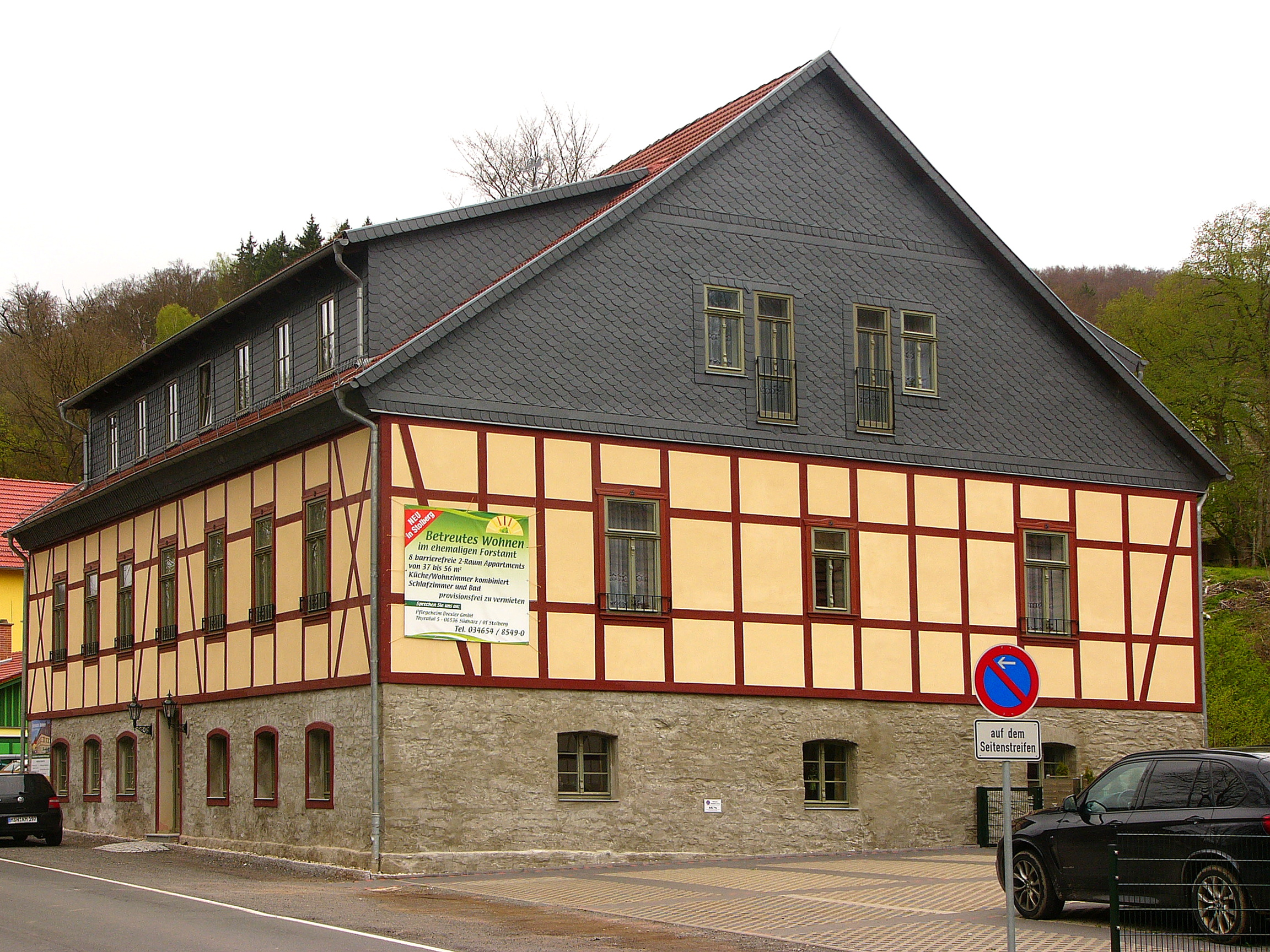 Forsthof; Denkmalnr.: 094 30473.